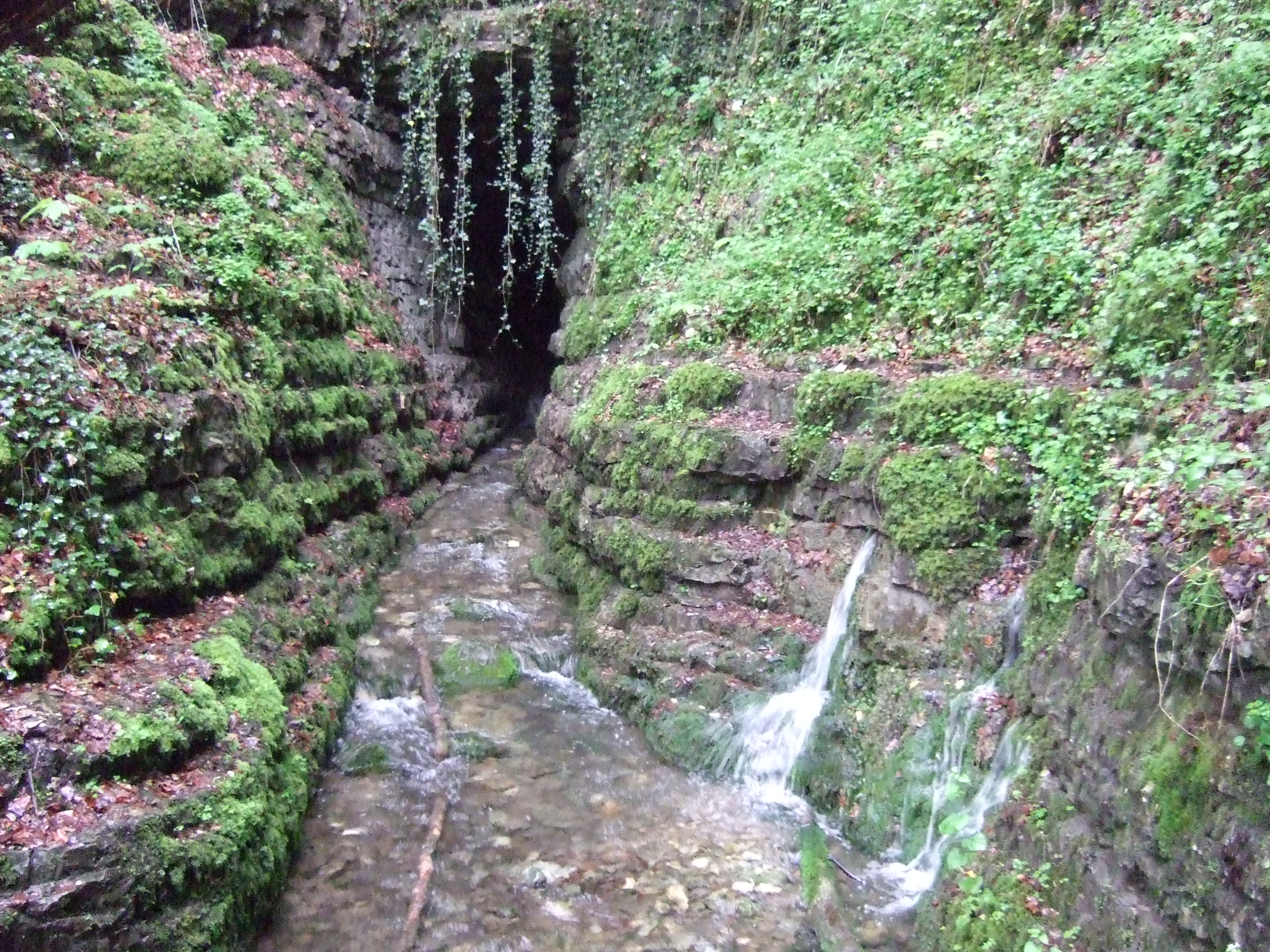 Das Goldloch bei Schlattstall ist einer der beiden Ursprünge der Schwarzen Lauter